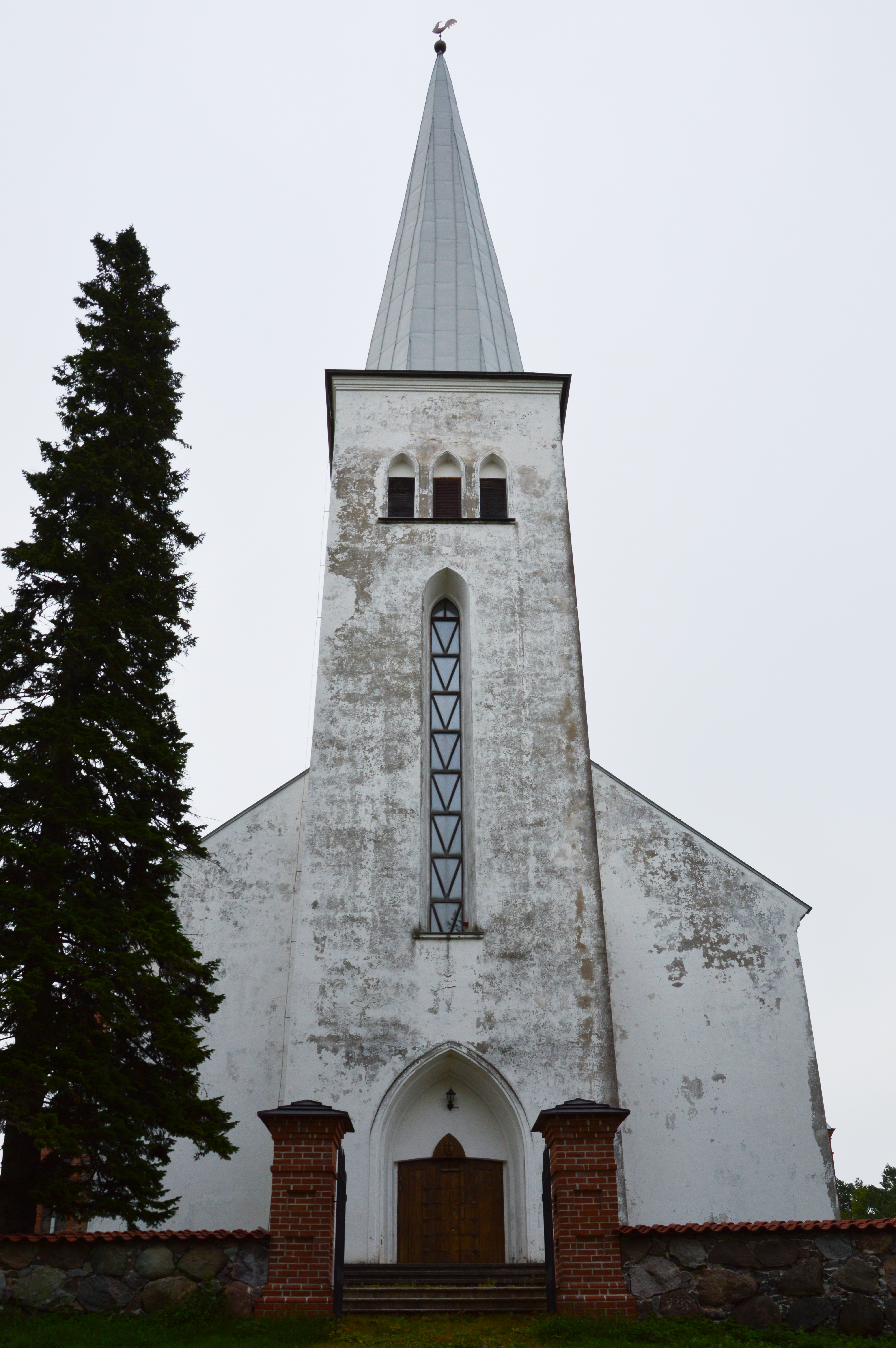 Kambja kirik